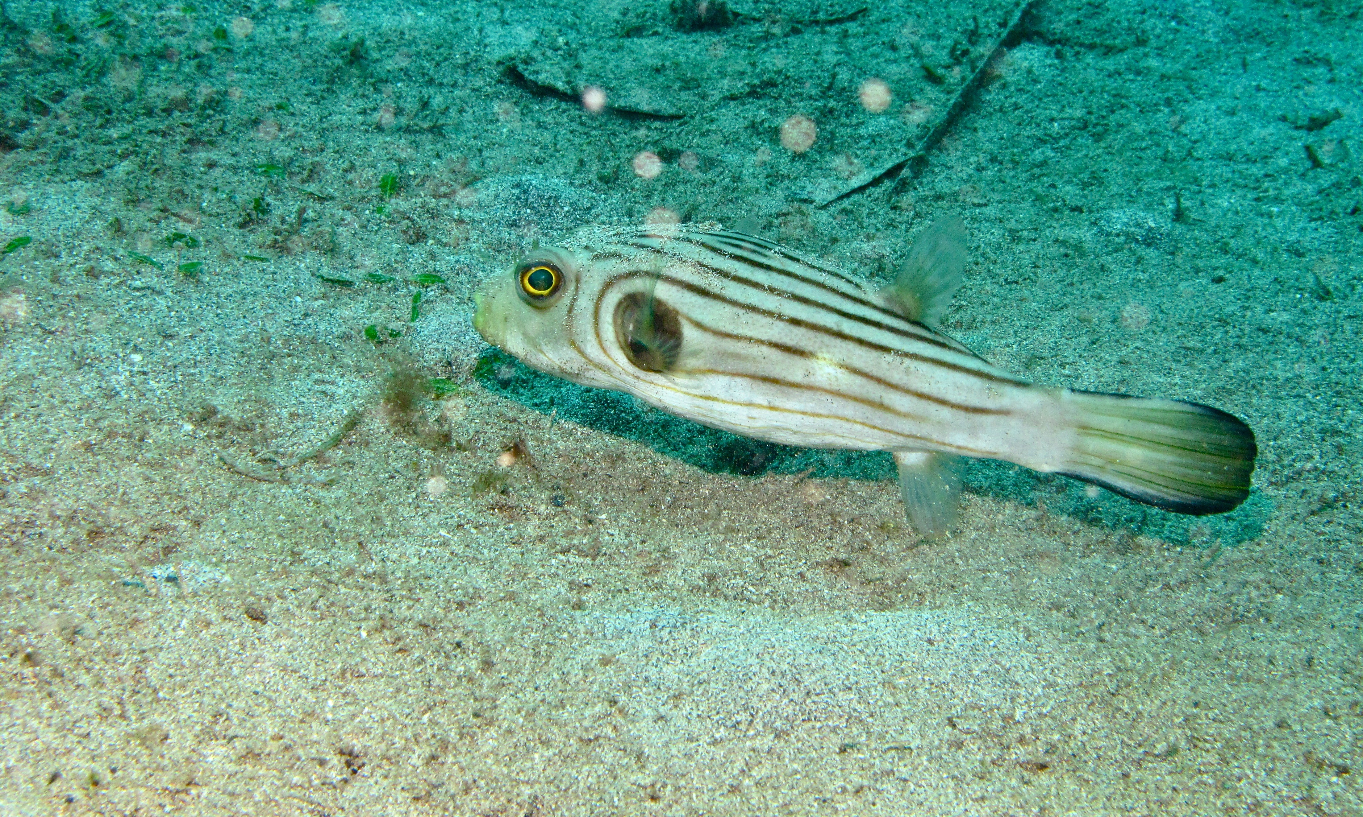 Wori I Manado, Sulawesi, INDONESIA